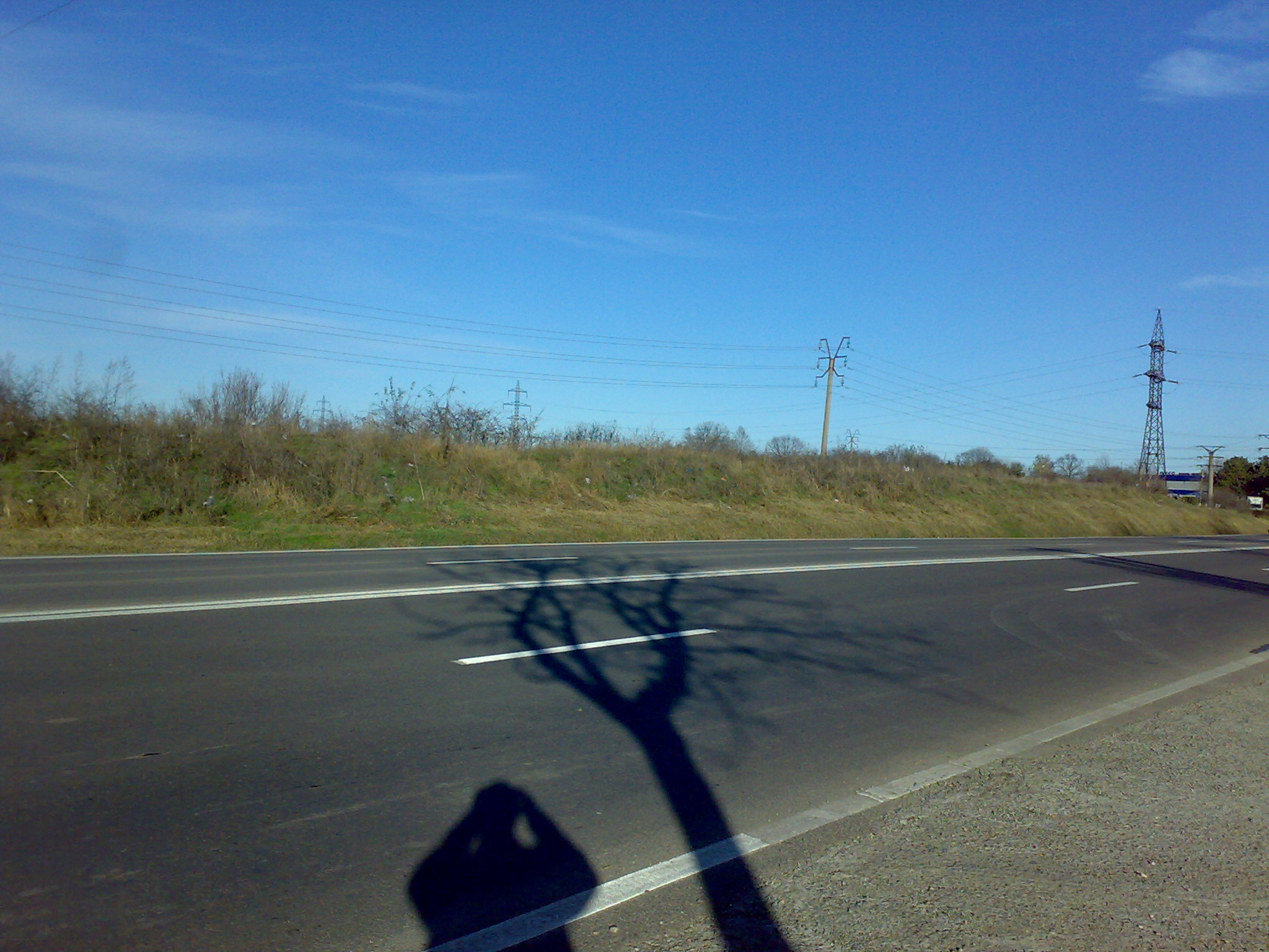 Valul de piatră 09